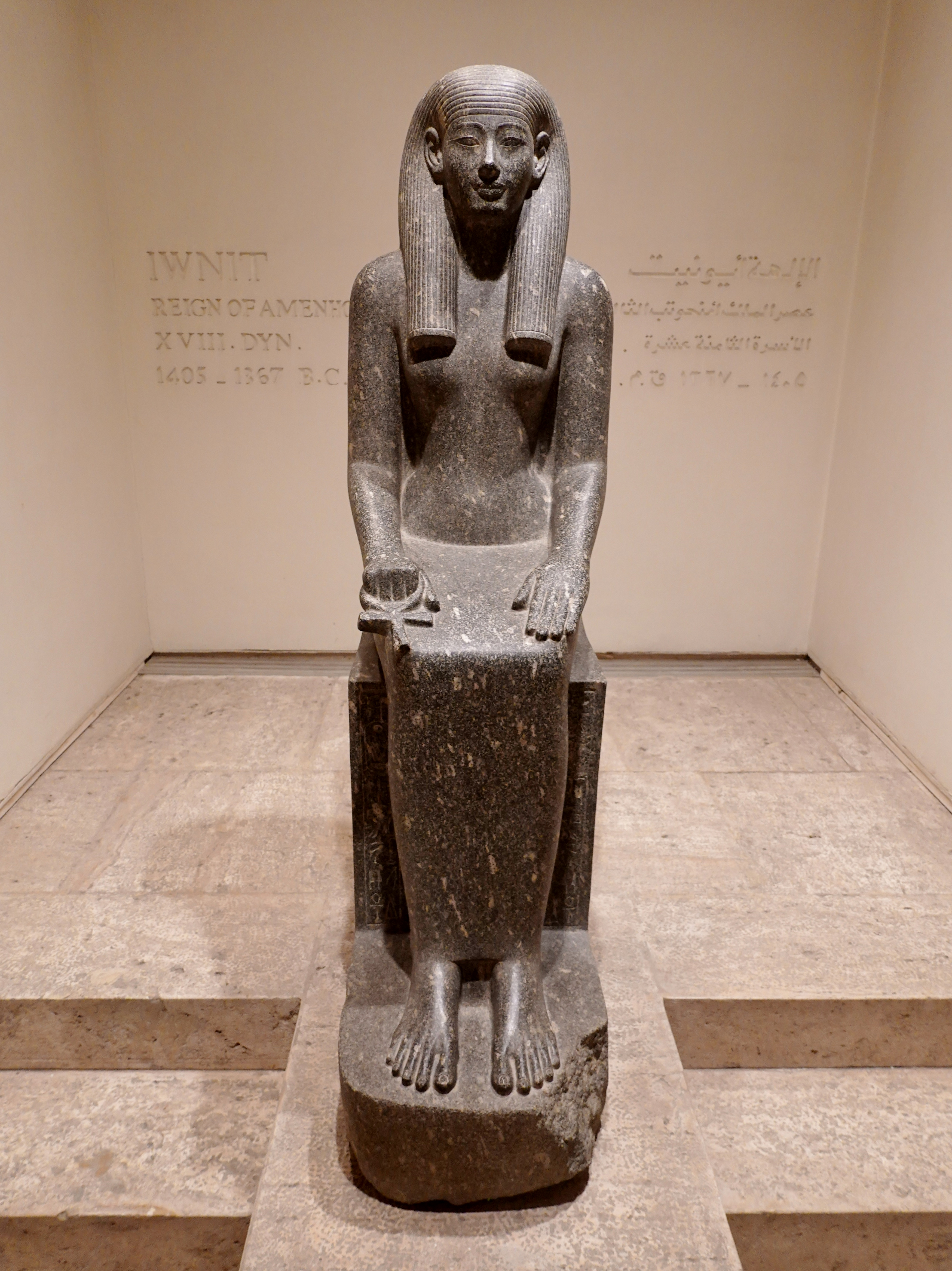 Statue der Göttin Iunit aus der Zeit des Königs Amenophis III. (Granit, 18. Dynastie), gefunden 1987 in der Cachette des Luxor-Tempels, ausgestellt im Luxor-Museum, Ägypten